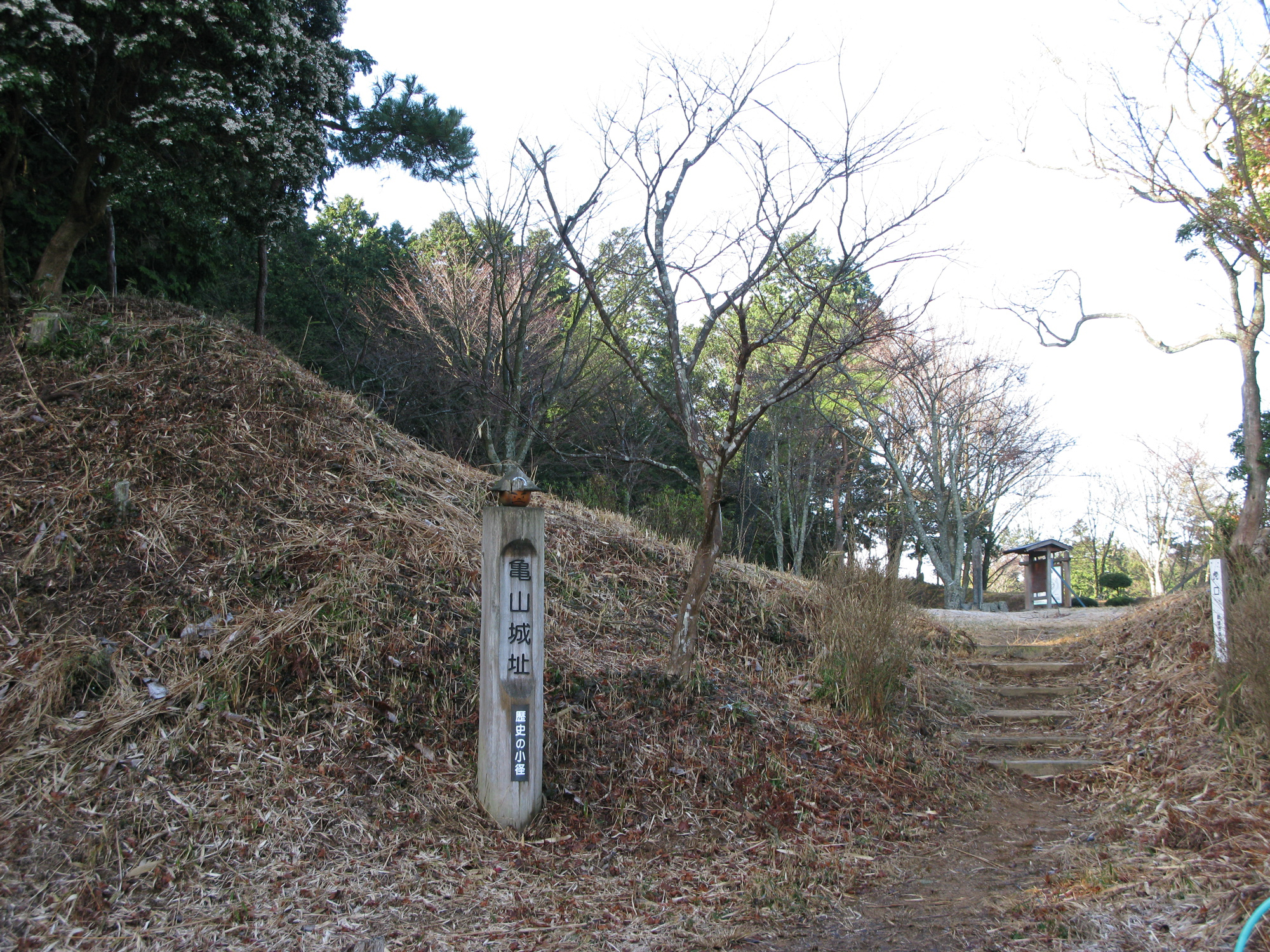 亀山城